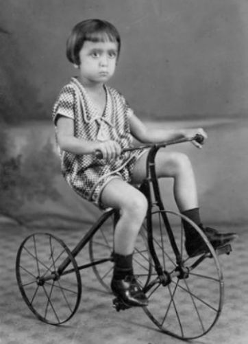 O escritor Millôr Fernandes na infância.